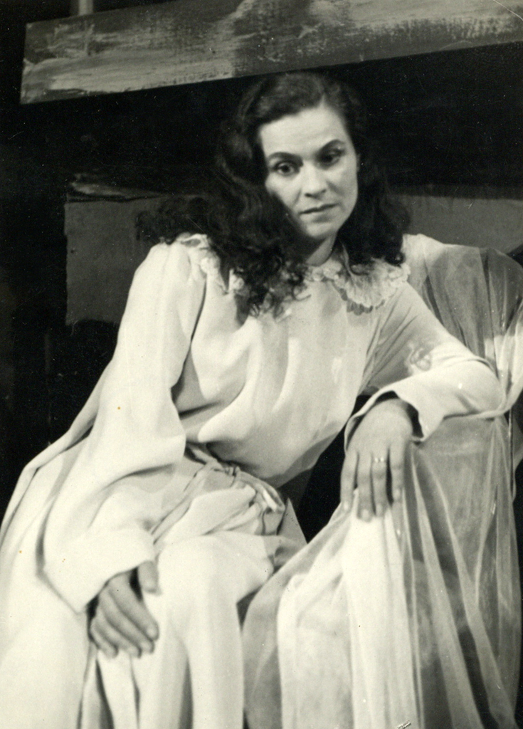 Slavko Grum, Dogodek v mestu Gogi, Mestno gledališče v Ljubljani. Na fotografiji: Vladoša Simčič (Hana).